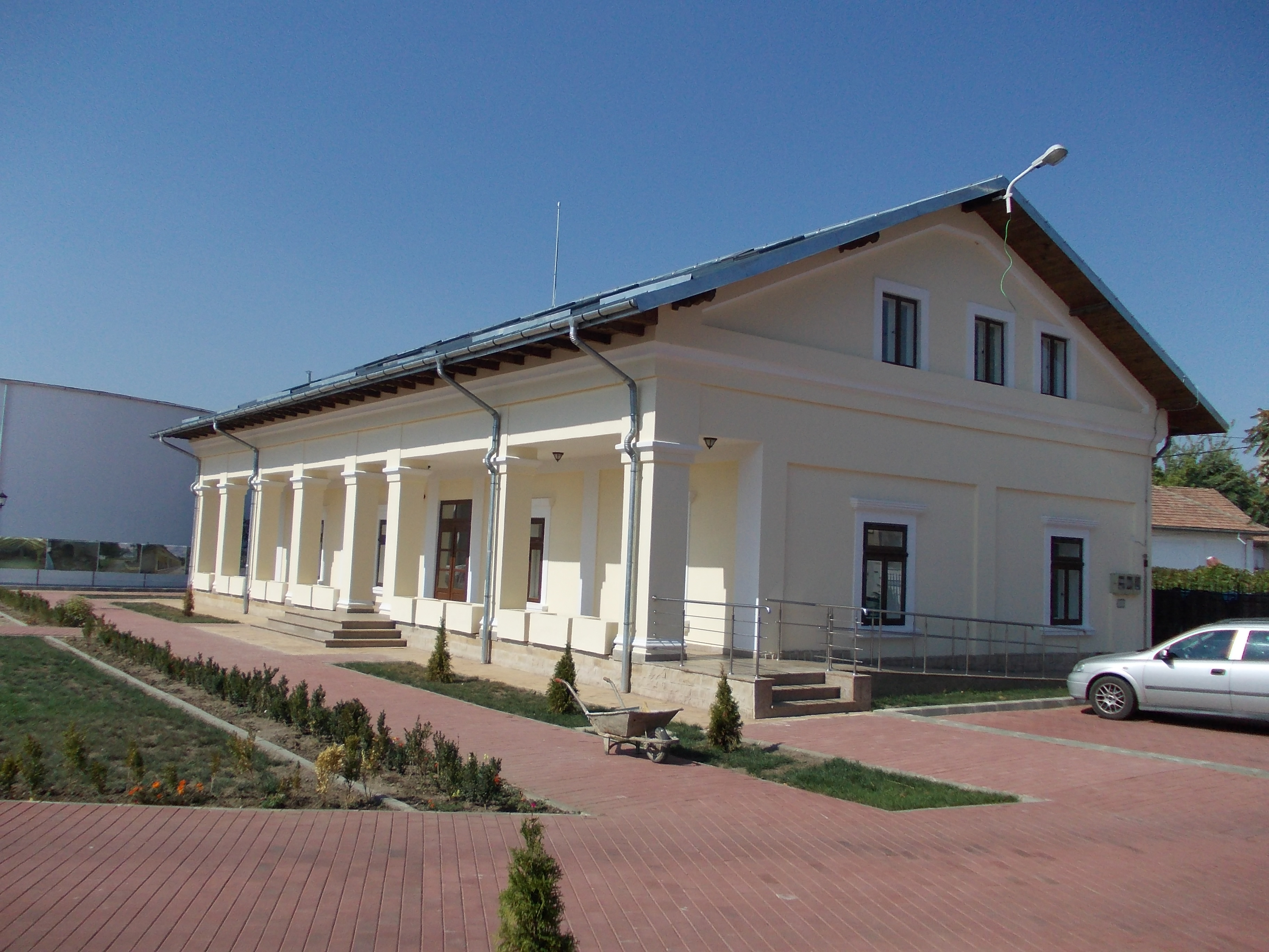 Școala de cântărețibisericești 03